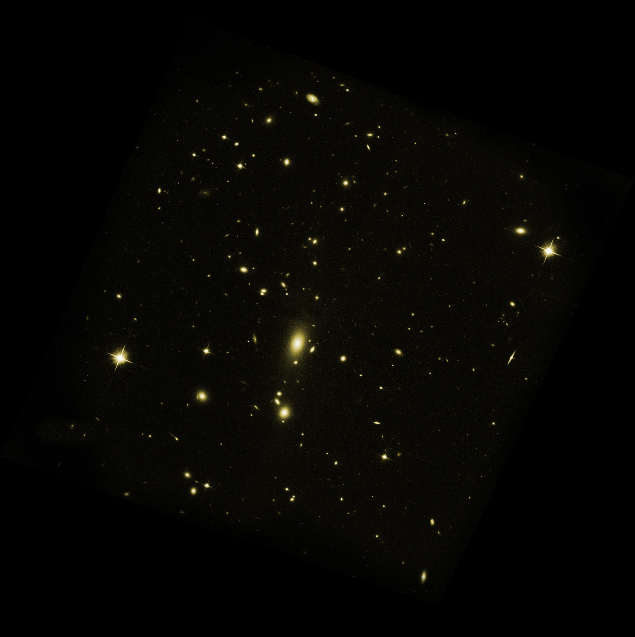 MS 0735.6+7421 o MS 0735 de forma abreviada, es un cluster de galaxias que se encuentra a 2600 millones de años luz de la tierra y se compone de varias docenas de galaxias. En el centro del cluster se observa una galaxia brillante en cuyo nucleo se localiza un agugero negro supermasivo con una masa equivalente a unos 1000 millones de masas solares.